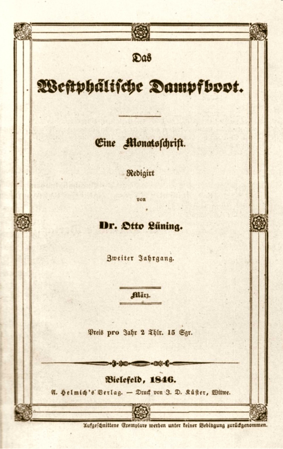 Titelblatt der linksdemokratisch/frühsozialistischen Zeitschrift Das Westphälische Dampfboot vom März 1846